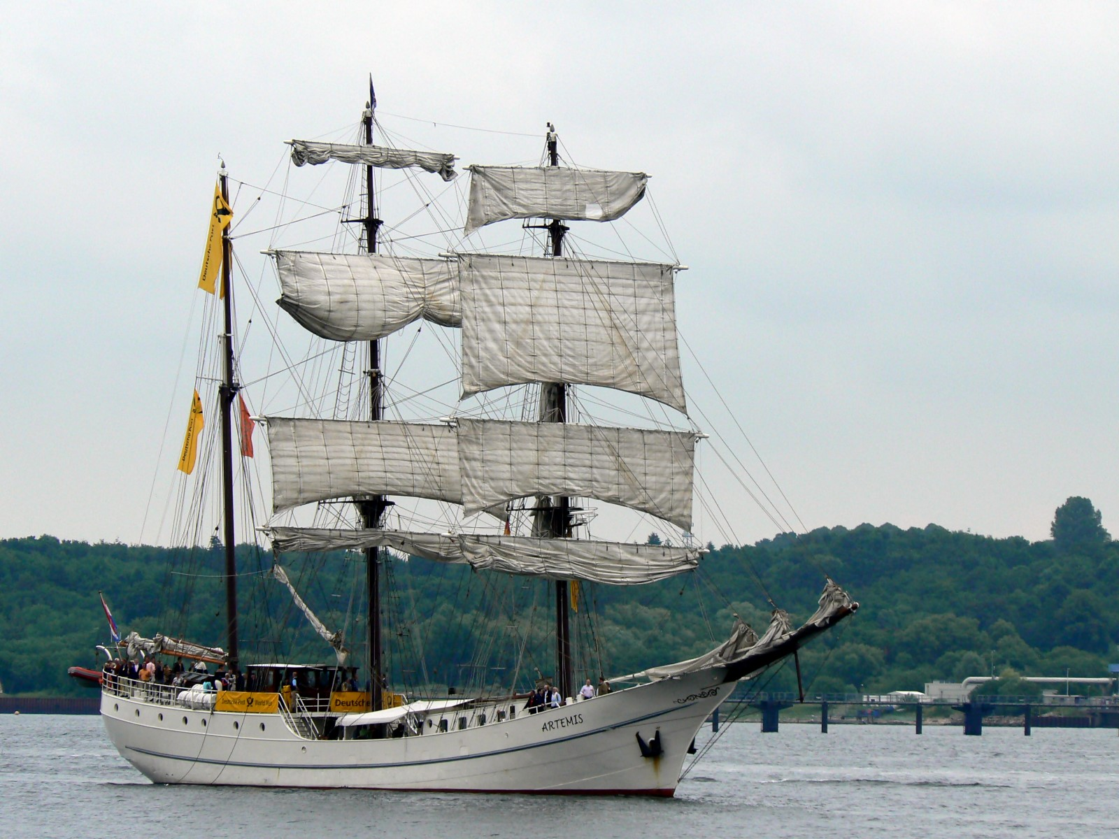 Segelschiff (Dreimastbark) Artemis auf der Kieler Woche 2007.